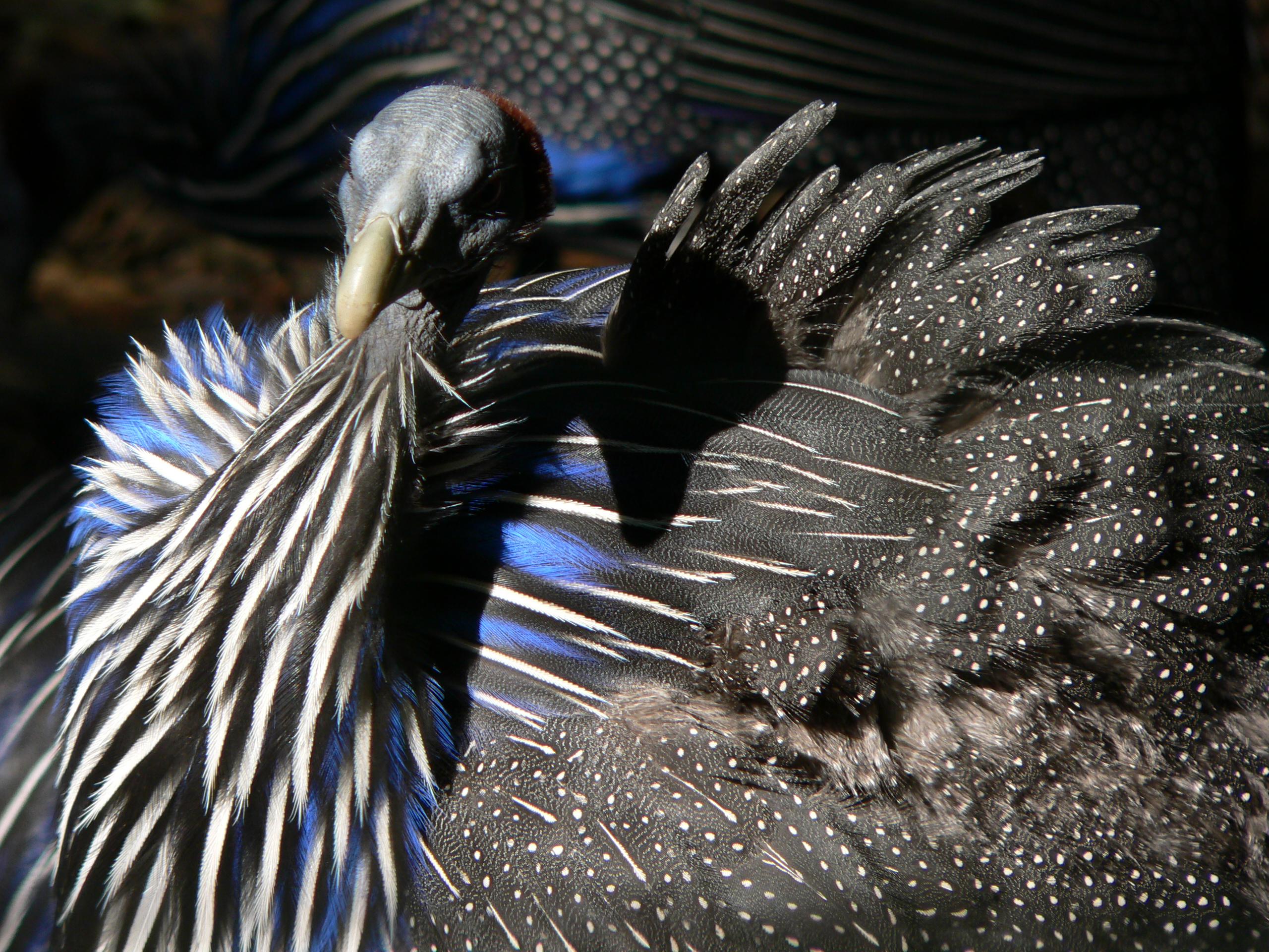 Acryllium vulturinum